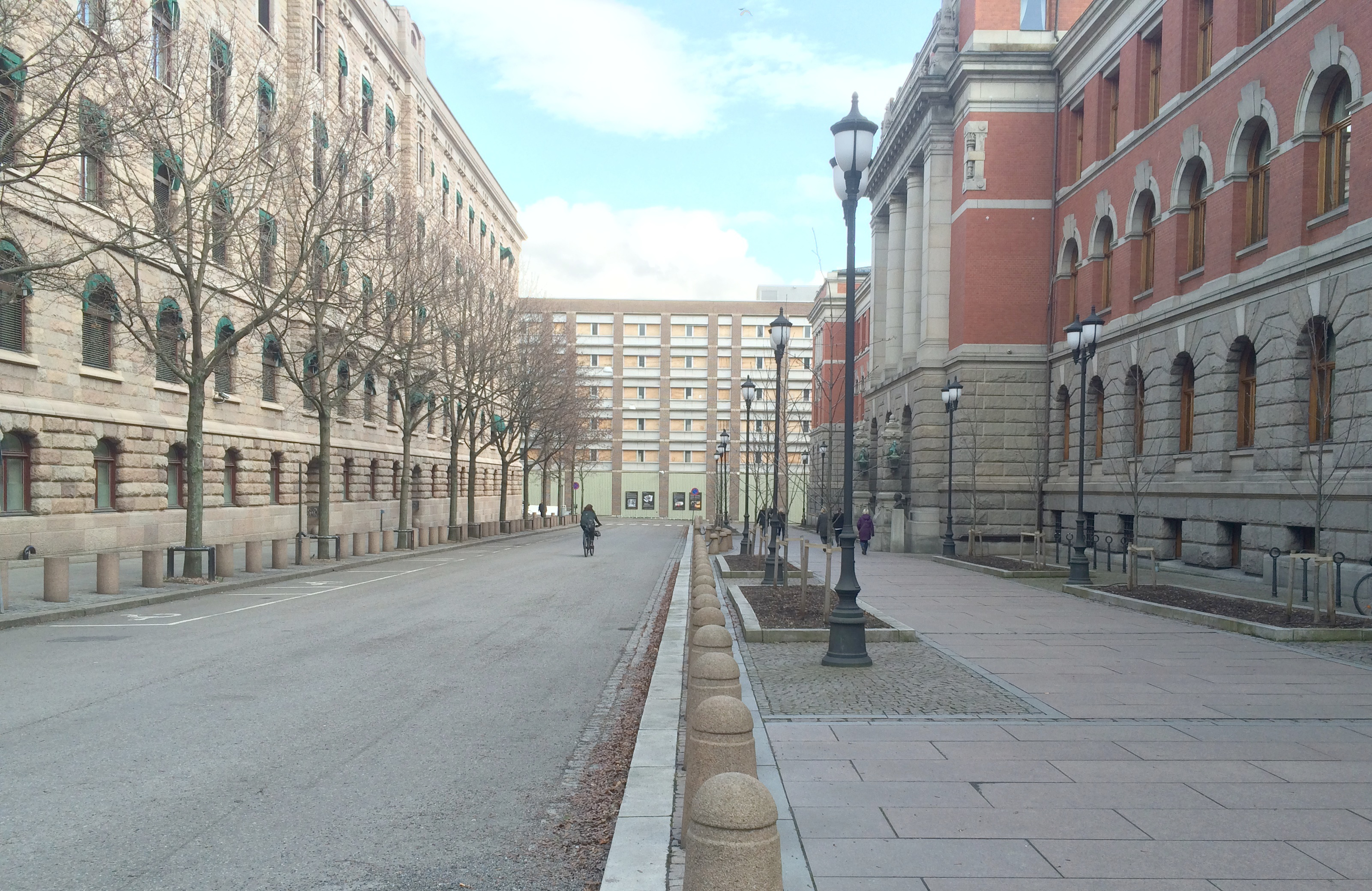 Høyesteretts plass mot Grubbegata